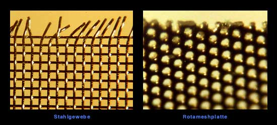 Siebdruckgewebe